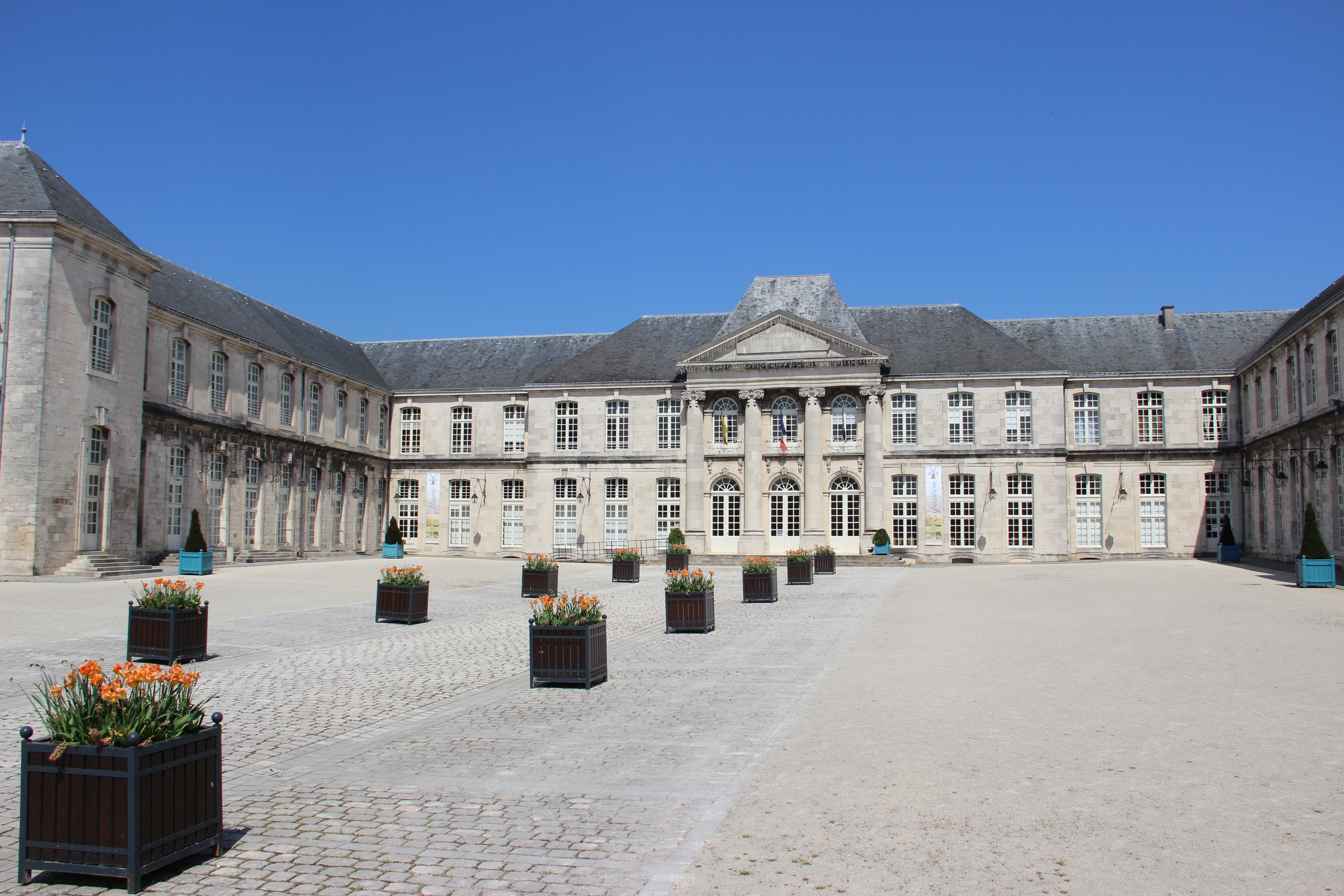 Façade avant du château